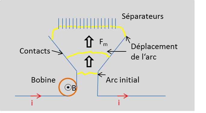 Schéma explicatif du déplacement de l'arc électrique dans un disjoncteur basse tension pour le courant continu